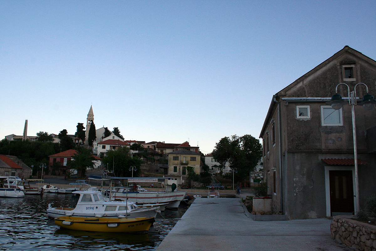 Kali, by night